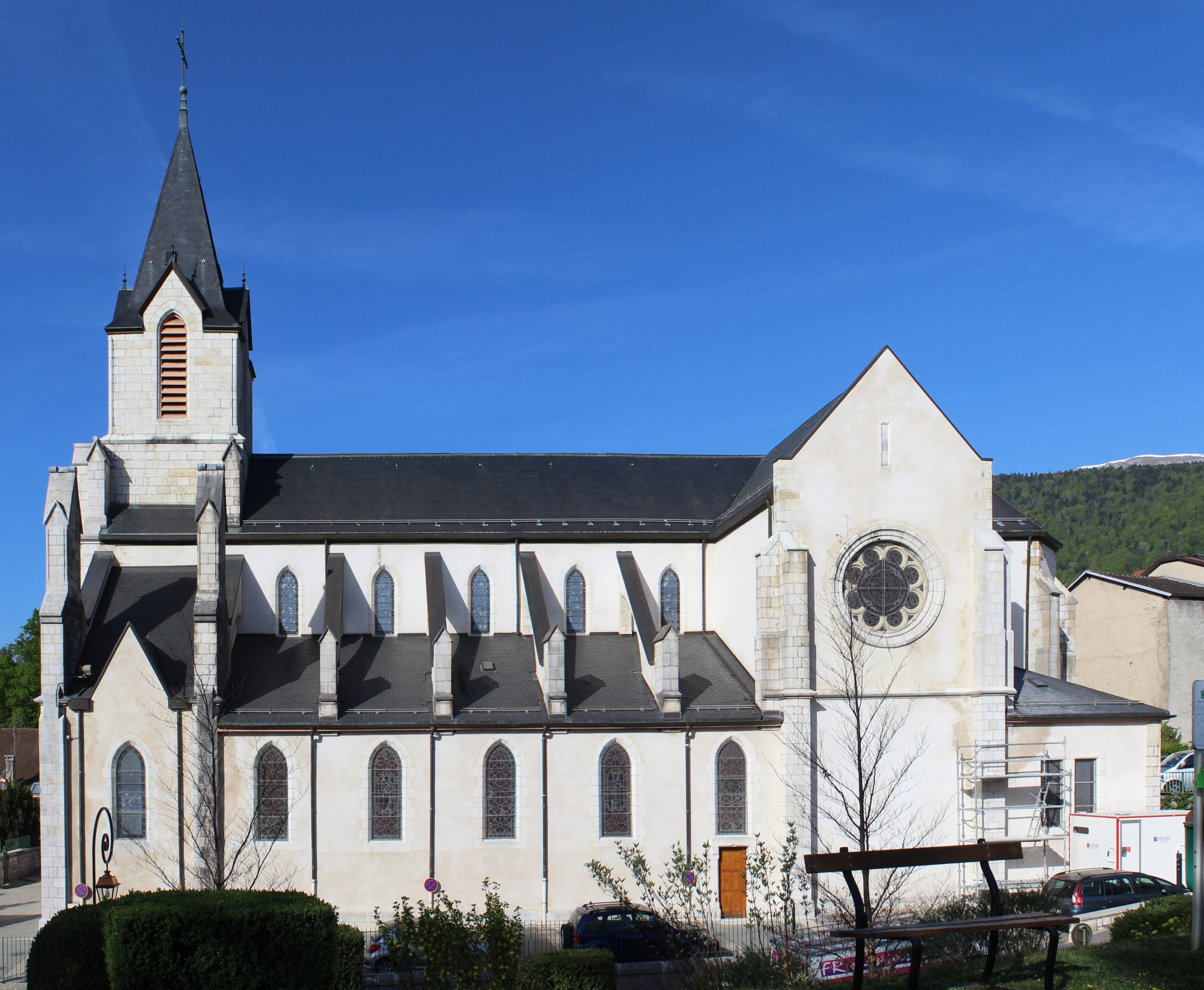 Église Saint-Pierre de Gex.